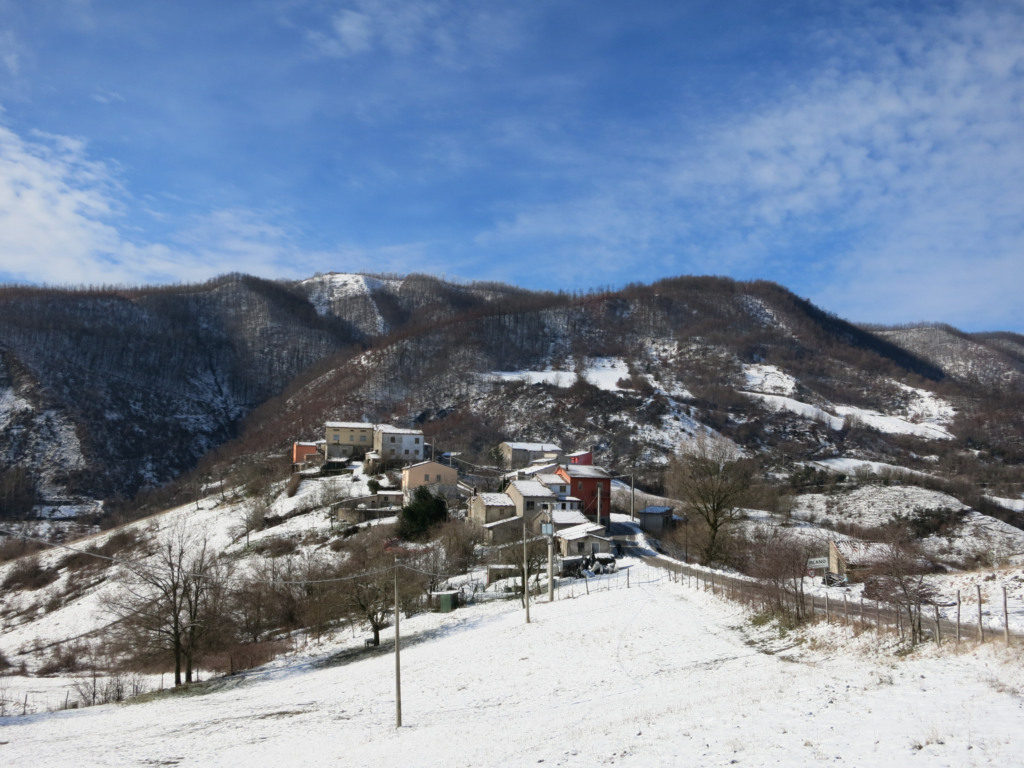 Villaggio di Vilano in inverno